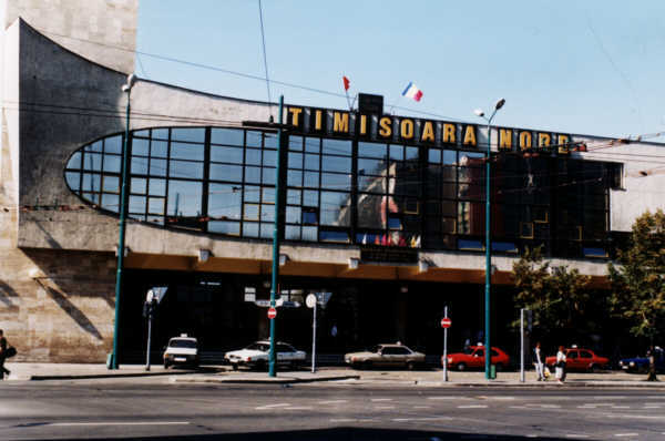 Gara Timisoara Nord.